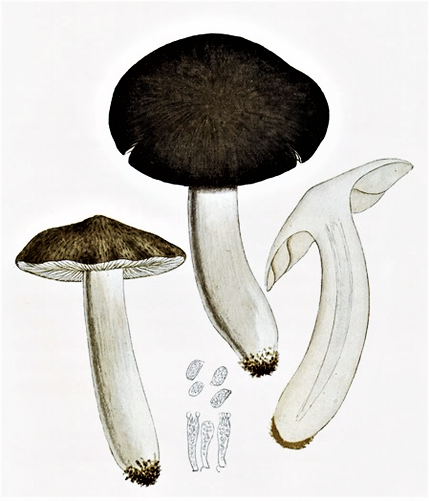 Giacomo Bresadola: Tricholoma terreum (Schaeff., 1774) P.Kumm. (1871)